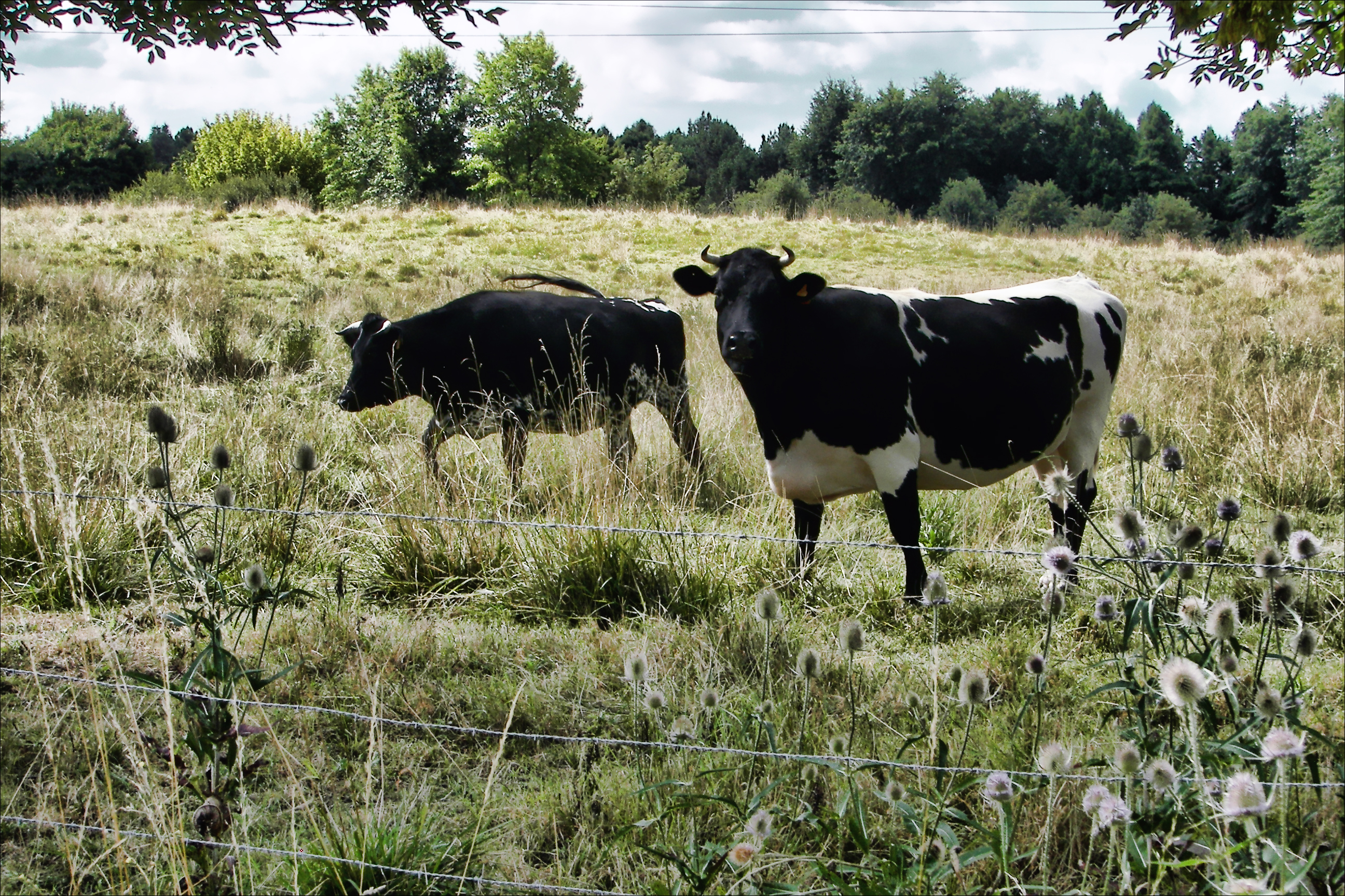 Vaches bordelaises dans le Parc Floral municipal de Bordeaux